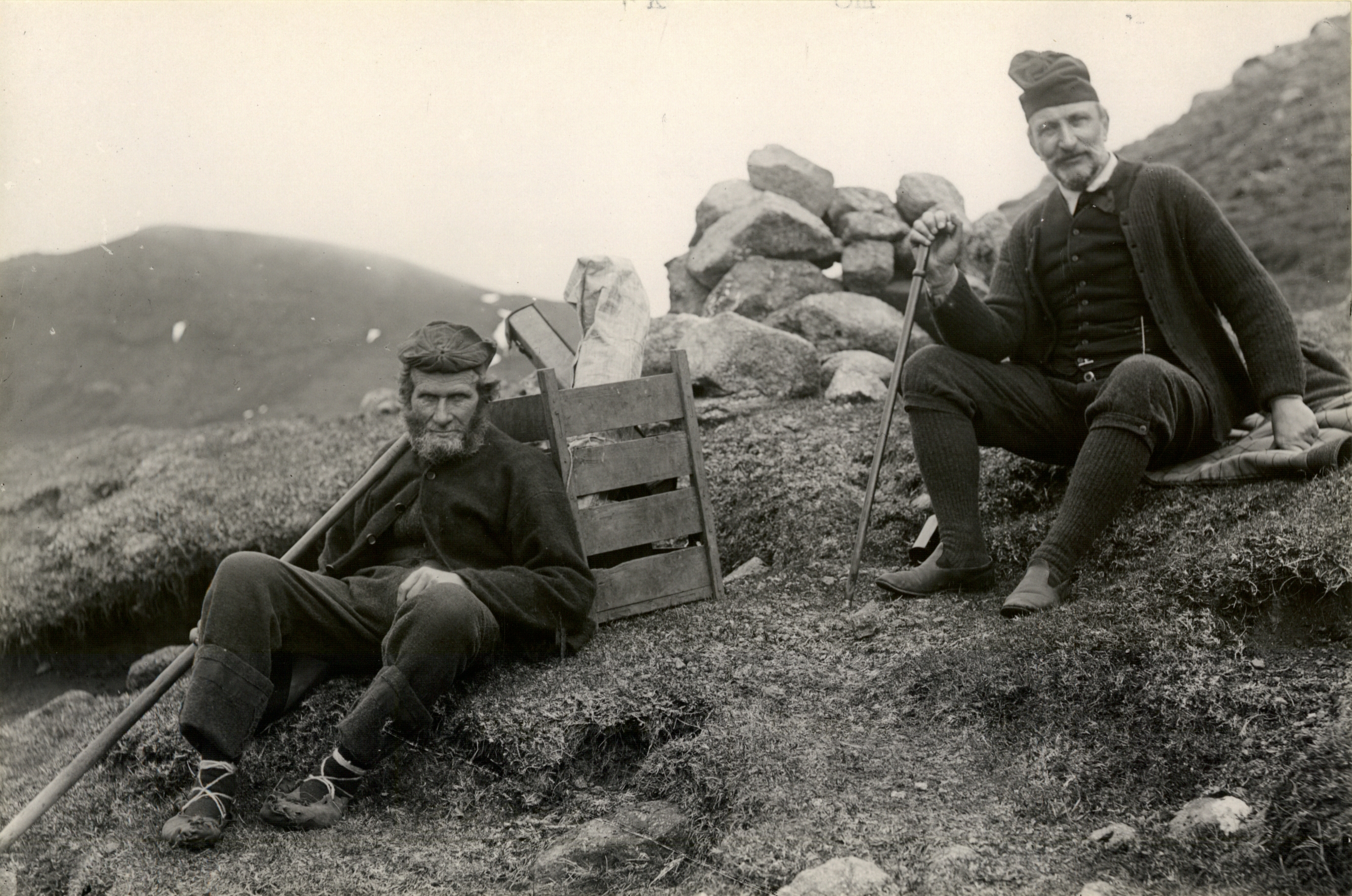 Rast under fjeldvandring ved en af de stensatte varder. Overlærer Bergh (til højre) har spadserestok og hjemmesko, følgemanden, der transporterer hans bagage i en leypur, har hudesko (skindsko) og fjeldstav, men lange bukser. Se også neg.47.937 under top.nr.3719, hvor det oplyses, at overlærer Berg og ledsager er på vej til Kvalvig. Det er usikkert, om de befinder sig indenfor Kvalvig sogn.